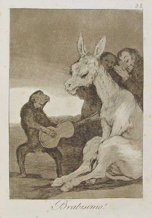 Capricho nº 38: ¡Bravísimo! de Goya, serie Los Caprichos